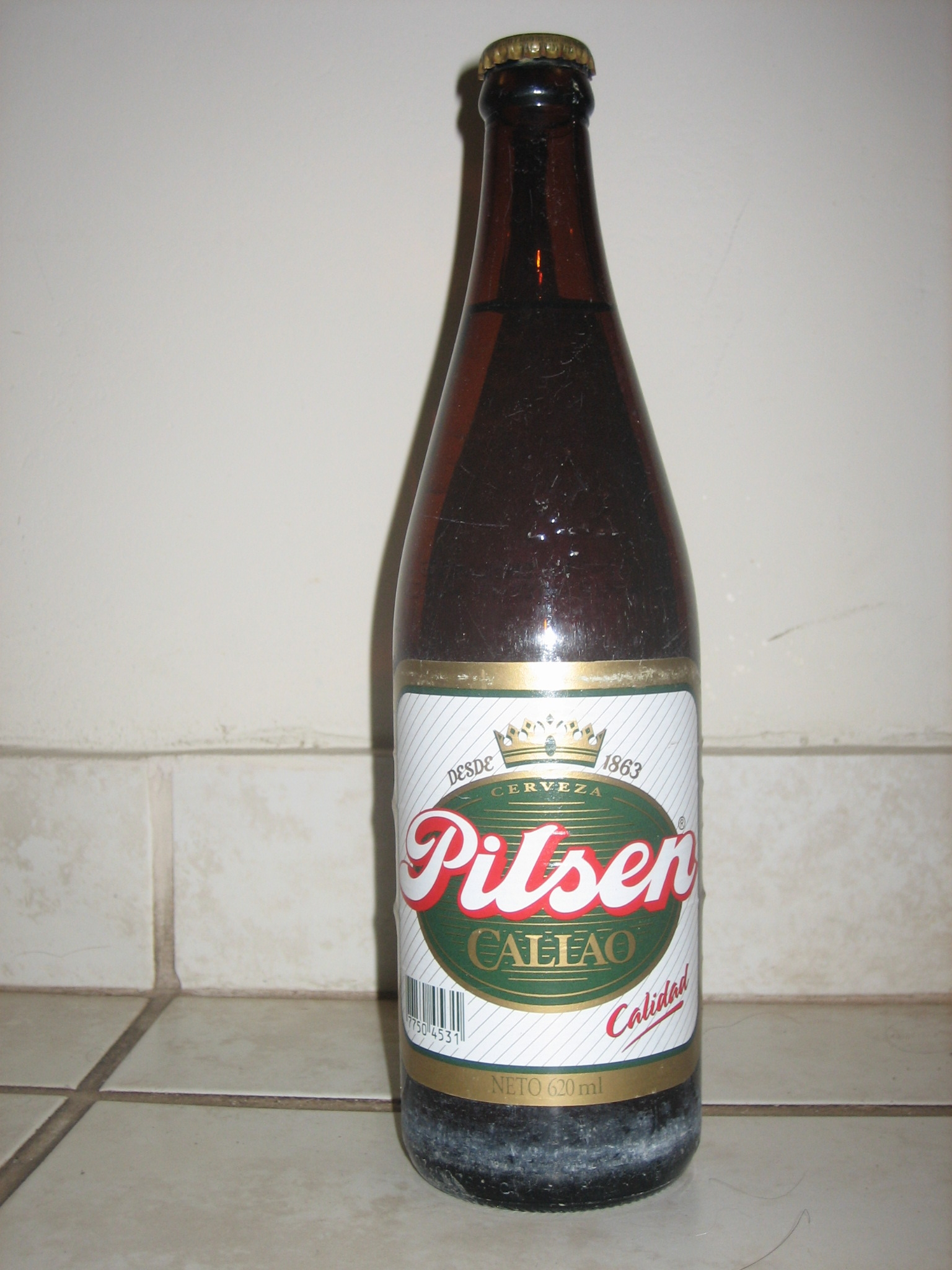 Eine Flasche Pilsen Callao